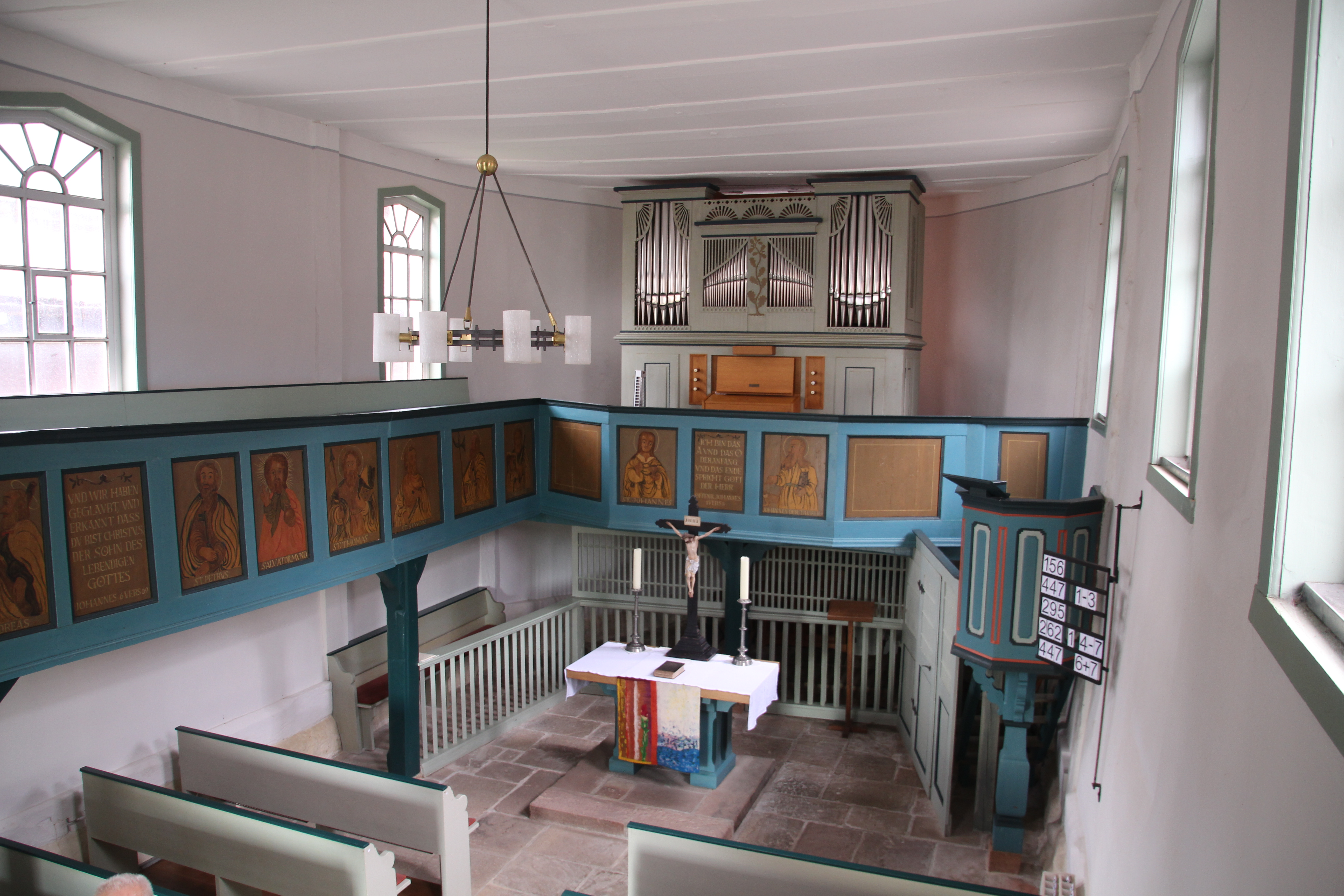 Siehe Bild und Dateiname